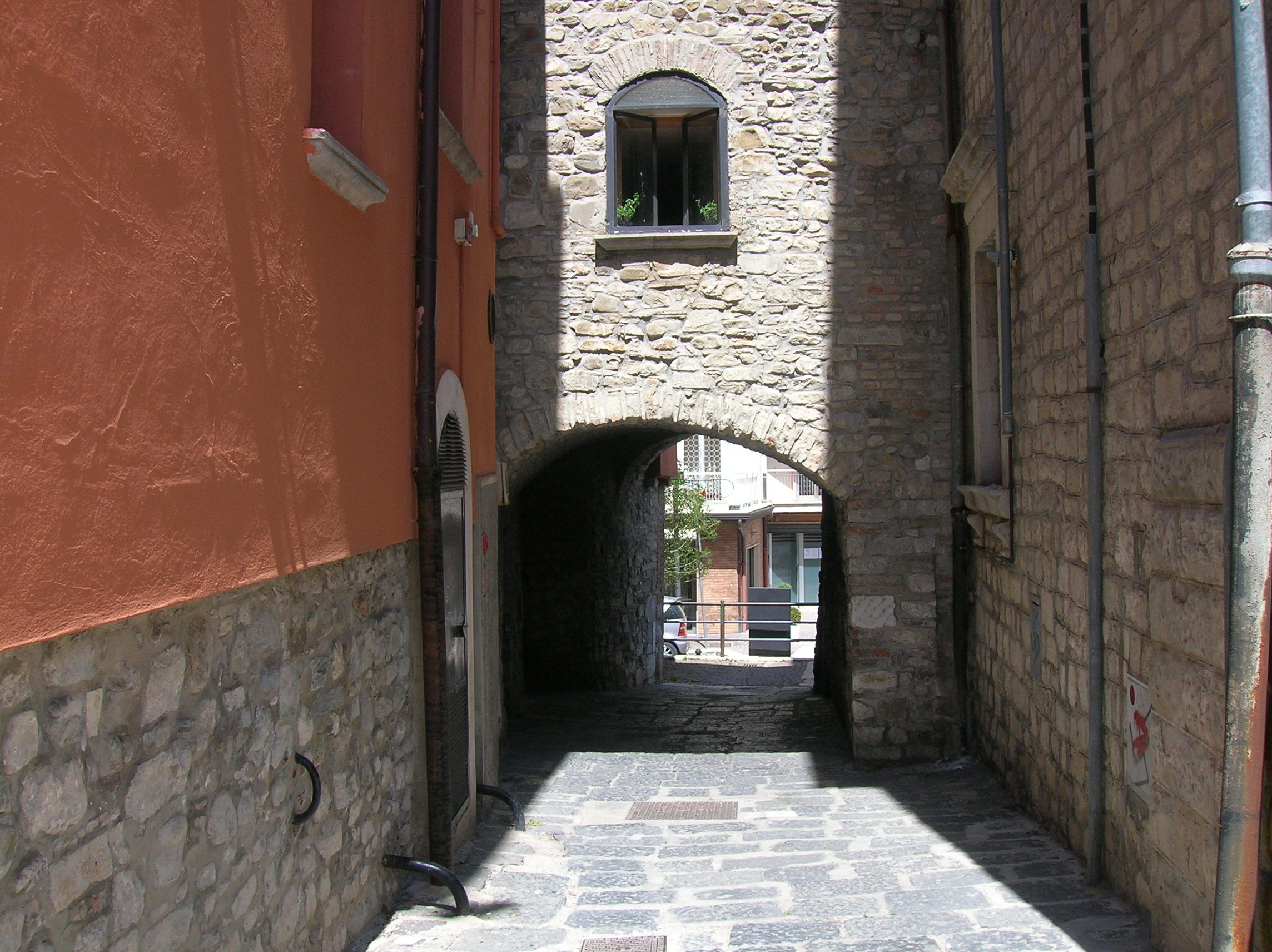 Vista frontale di Porta San Gerardo.